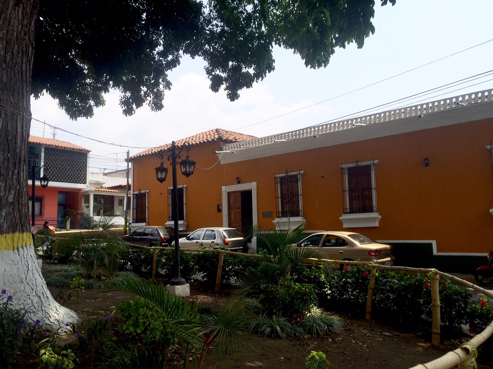 Museo Histórico Religioso de Ejido. Municipio Campo Elías, estado Mérida.